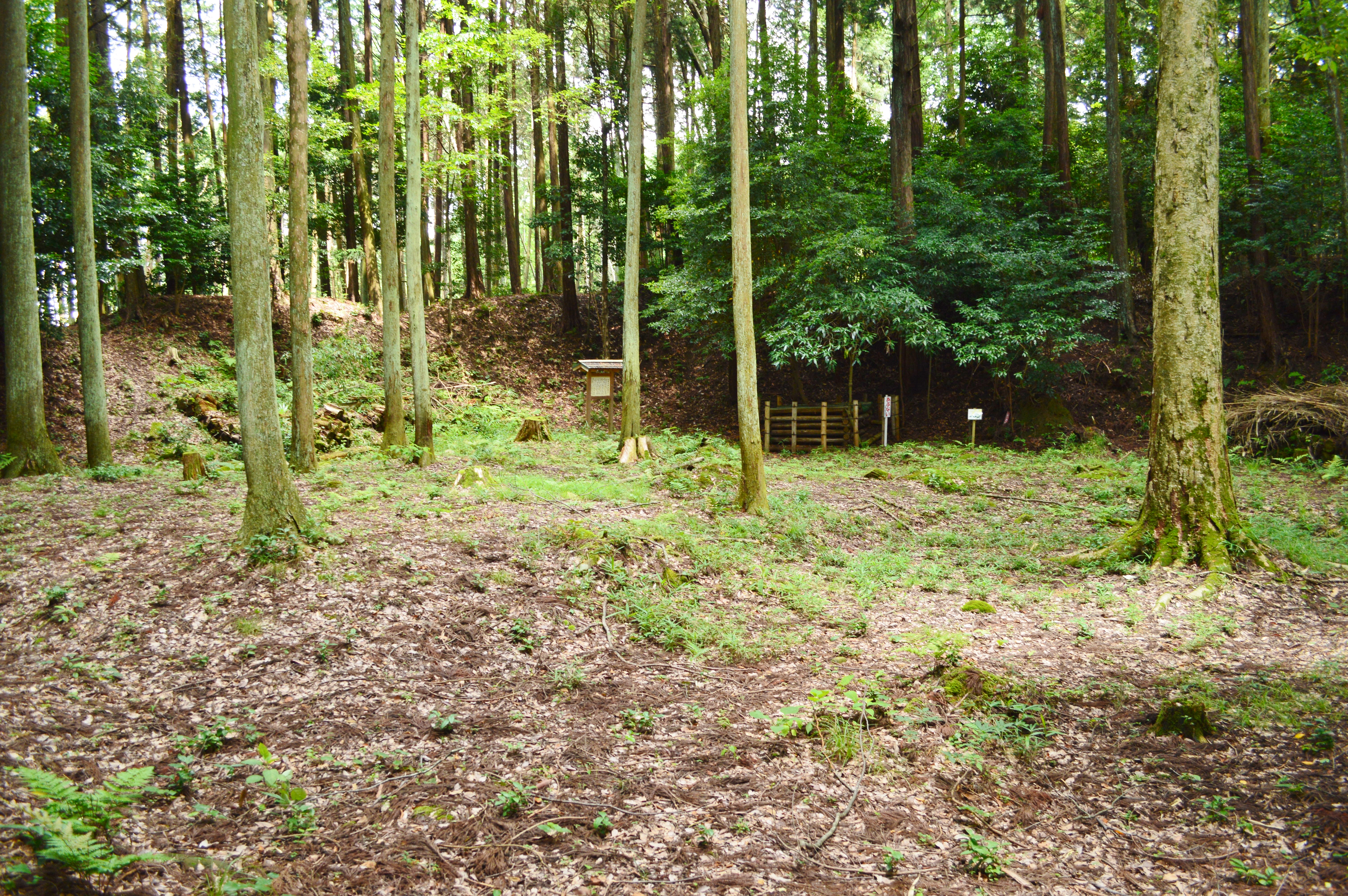 柏原城 (伊賀国) 本丸 Nikon D3200